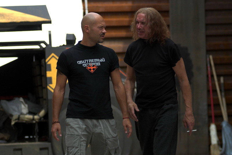 Фёдор Бондарчук и Сергей Гармаш на съёмках фильма "Обитаемый остров" This work is free and may be used by anyone for any purpose. If you wish to use this content, you do not need to request permission as long as you follow any licensing requirements mentioned on this page.